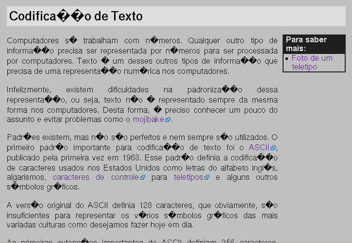 Texto codificado em ISO-8859-1 e apresentado com se estivesse codificado em UTF-8.